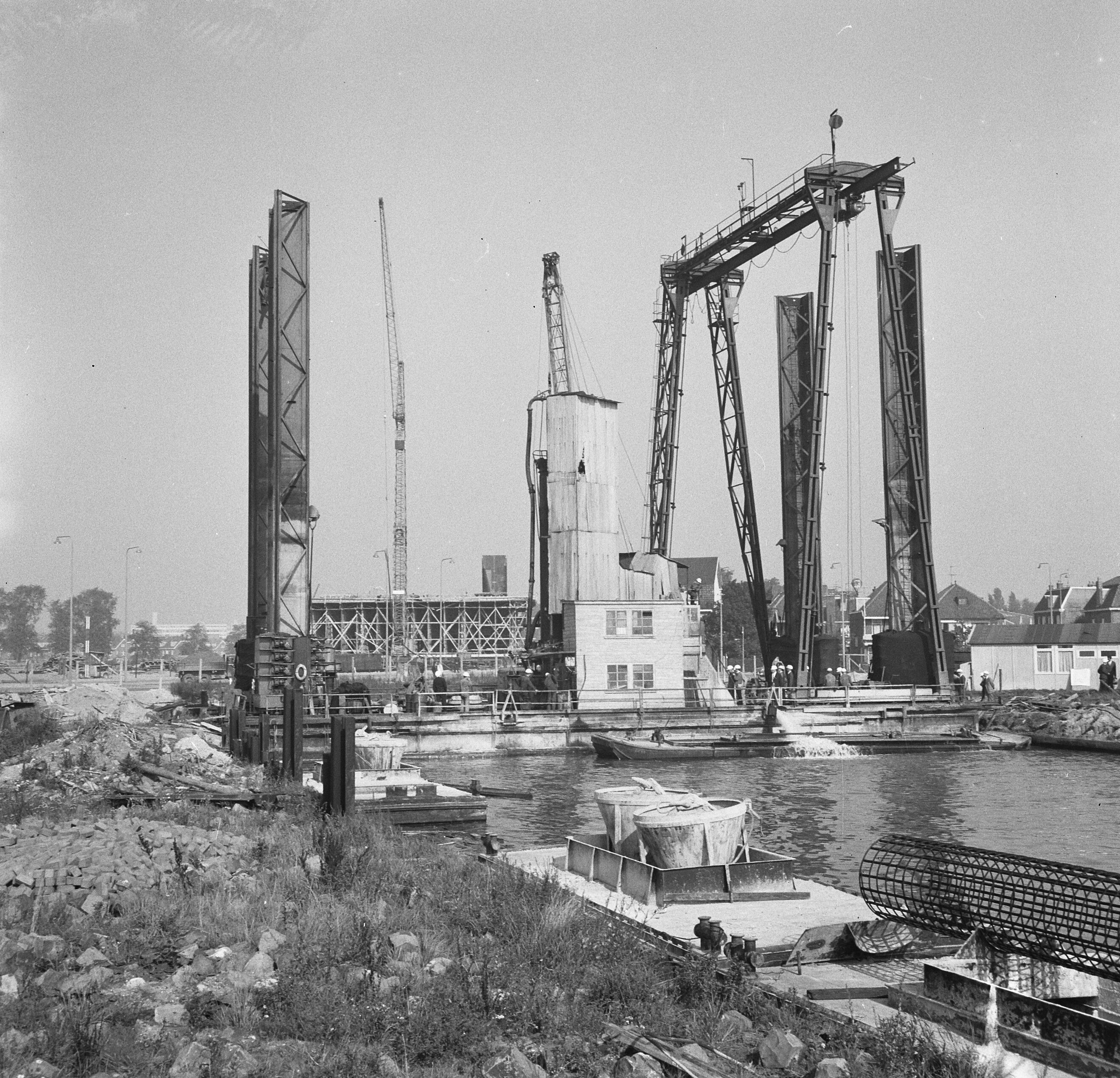 Collectie / Archief : Fotocollectie Anefo Reportage / Serie : [ onbekend ] Beschrijving : IJ-tunnel in aanbouw, bouw IJ-tunnel Datum : 5 oktober 1965 Trefwoorden : aanbouw, tunnels Fotograaf : Nijs, Jac. de / Anefo Auteursrechthebbende : Nationaal Archief Materiaalsoort : Negatief (zwart/wit) Nummer archiefinventaris : bekijk toegang 2.24.01.03 Bestanddeelnummer : 918-2739 Reacties Geplaatst door Foto liefhebster op 28 juni 2016 - 18:36. Vierde IJ-tunneldag.